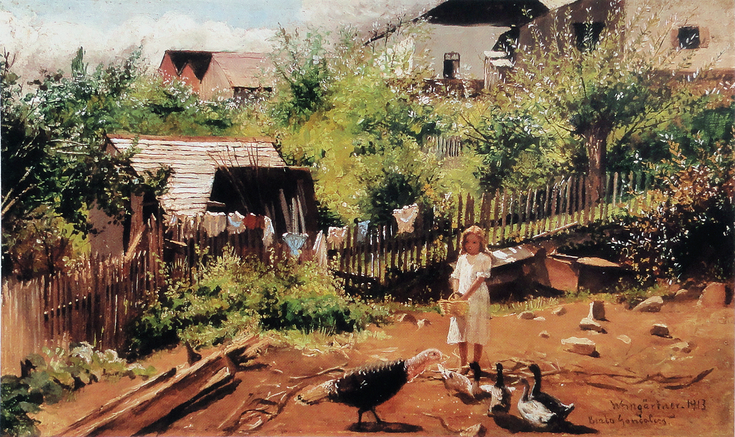 Fundo de quintal com menina (Bento Gonçalves), óleo sobre tela, 16 x 25 cm, coleção particular